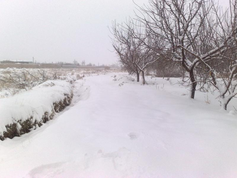 برف زمستان سال 1393